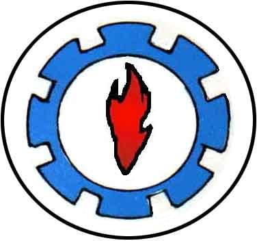 شعار محافظة السويس